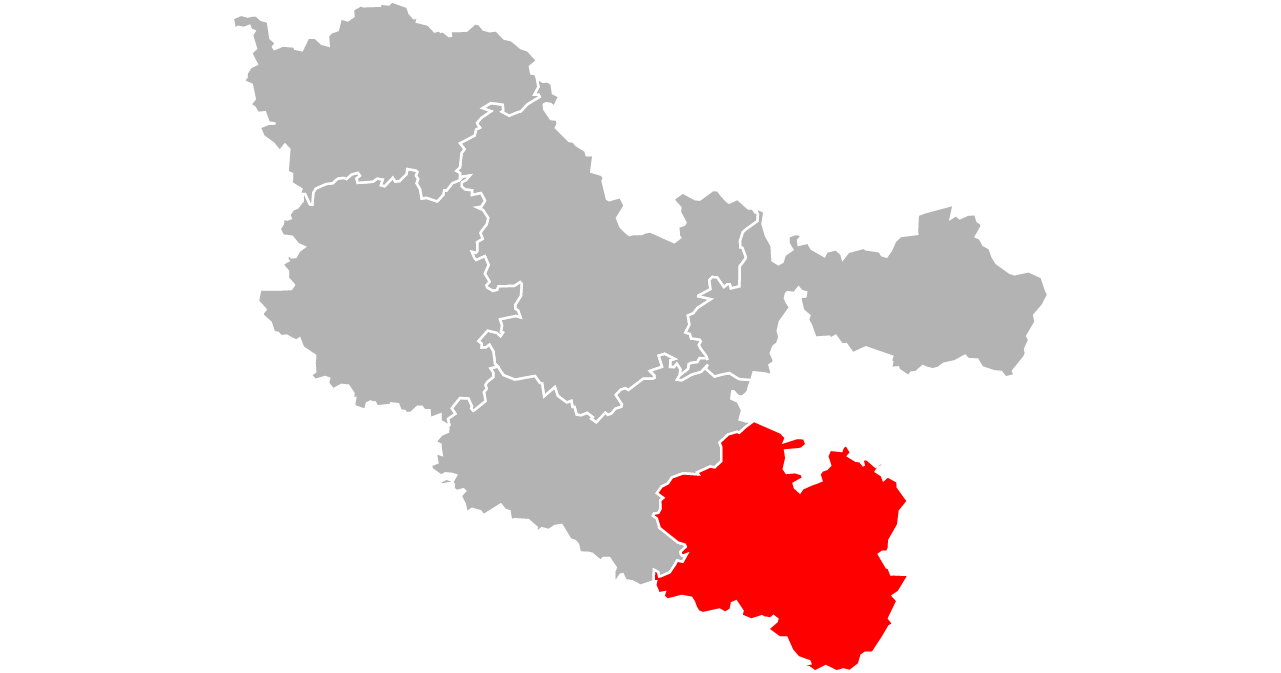 L'arrondissement de Sarrebourg.